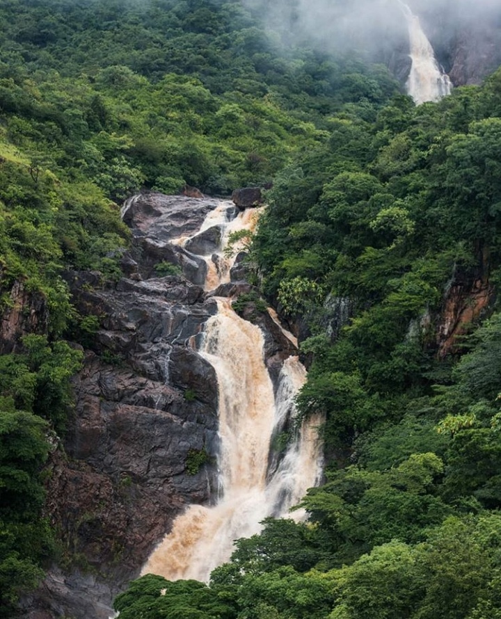 Toma aérea del Chorro de Olá